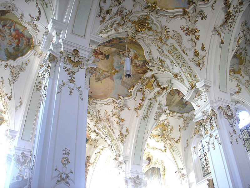 Wallfahrtskirche St. Maria (Andechs, Landkreis Starnberg, Oberbayern). Blick ins Gewölbe. Eigene Aufnahme, Sept. 2006 / Andechs Monastery: Pilgrimage church of St. Mary, (Upper Bavaria, Germany). View to the vault. Own photo, Sept. 2006